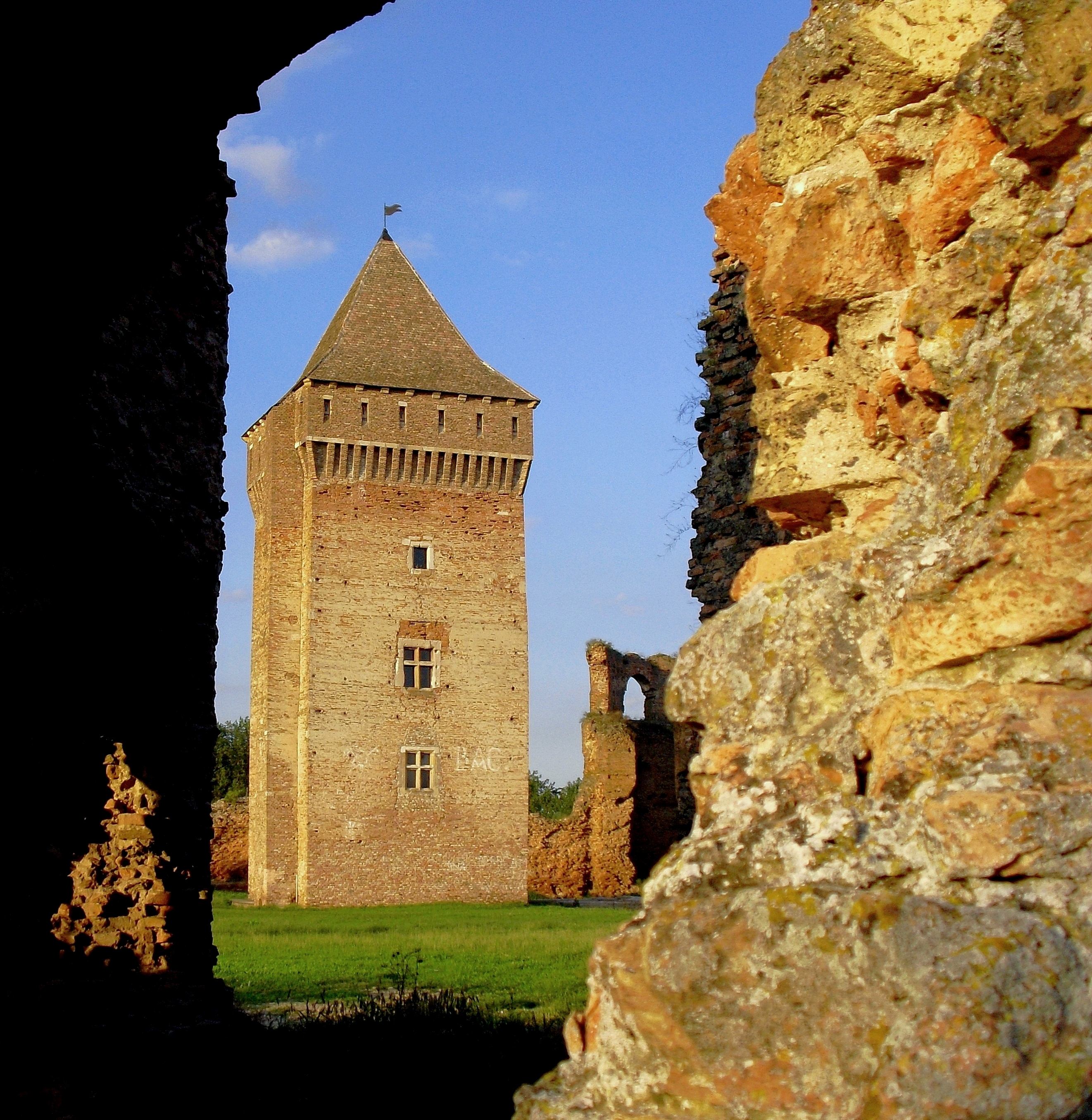 Кула витезова кроз рупу у зидинама,Бачке тврђаве...